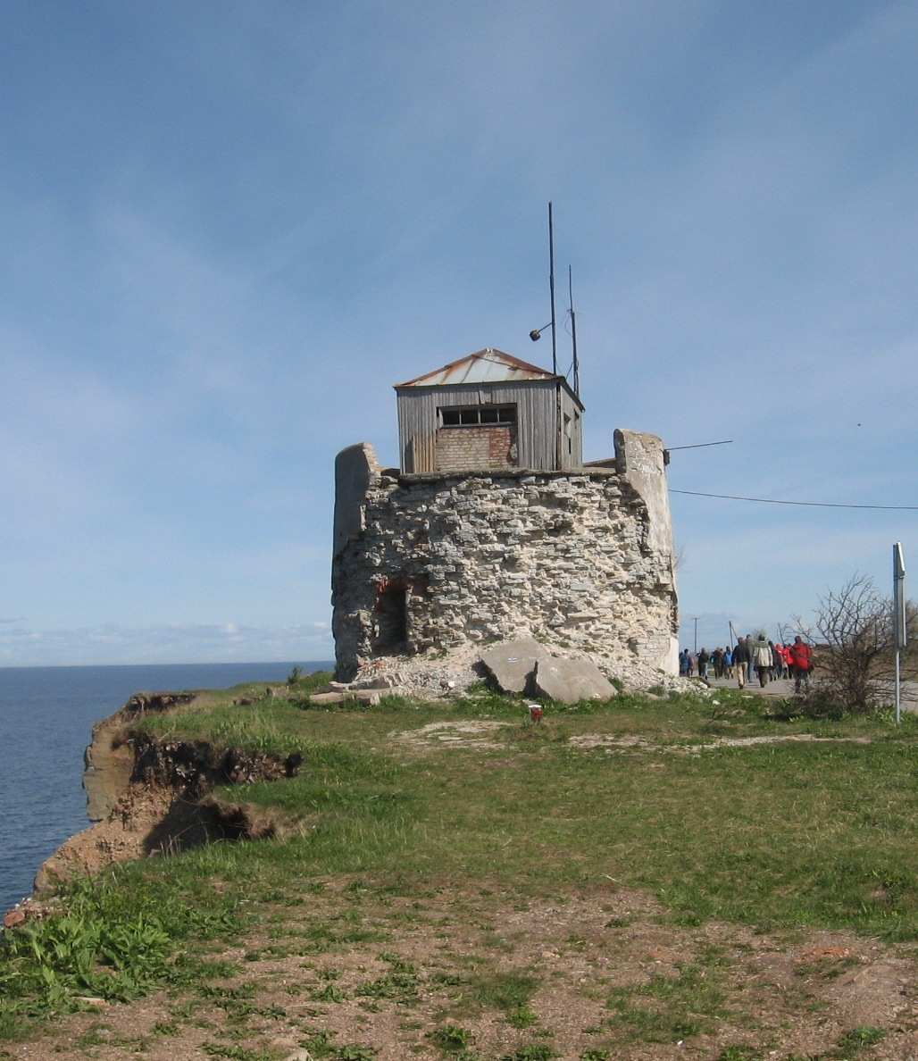 Pakri vana tuletorni varemed.